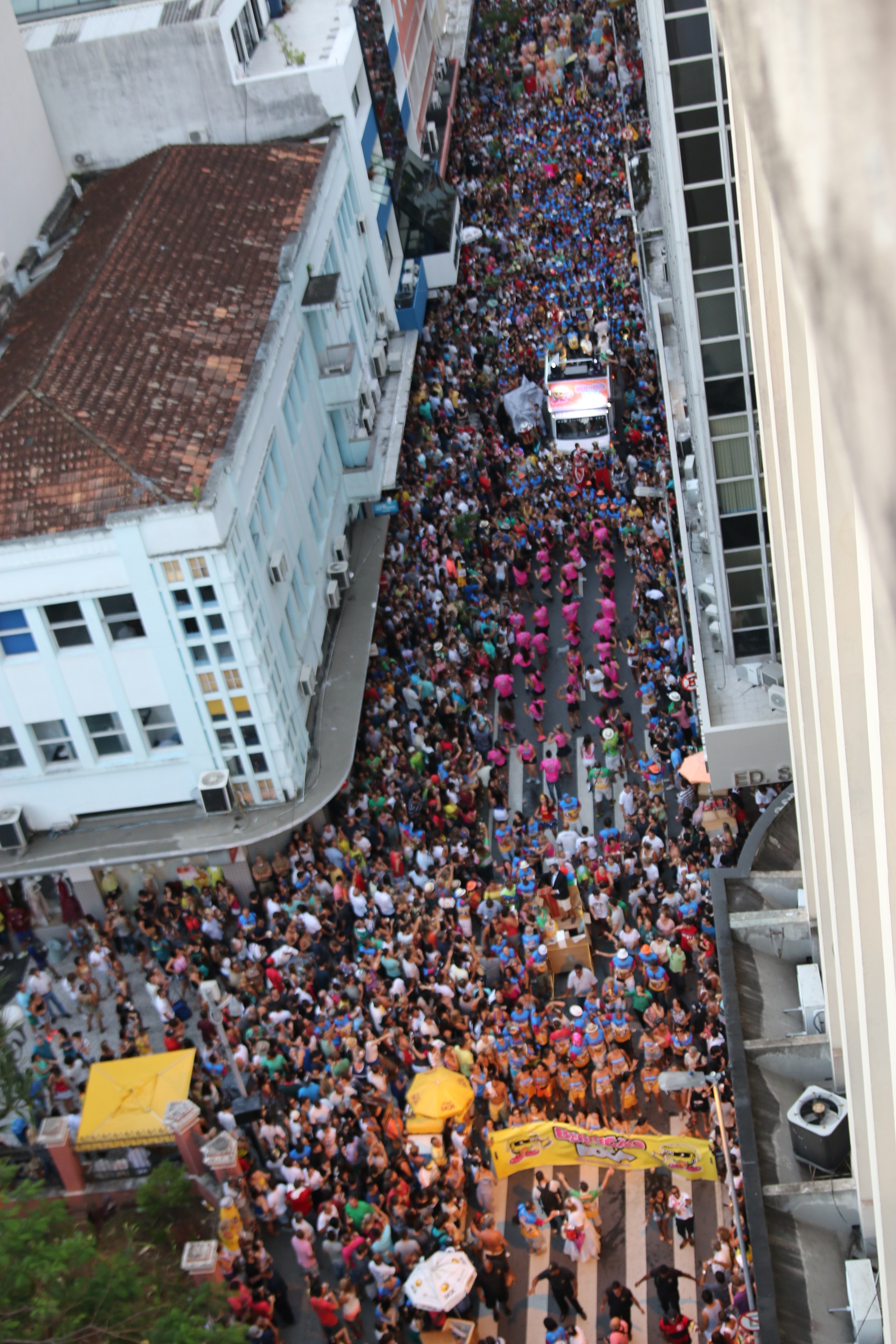 Arrastão do Berbigão do Boca na Rua Tenente Silveira em 2015.